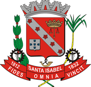 Brasão atualizado do municipio de Santa Isabel